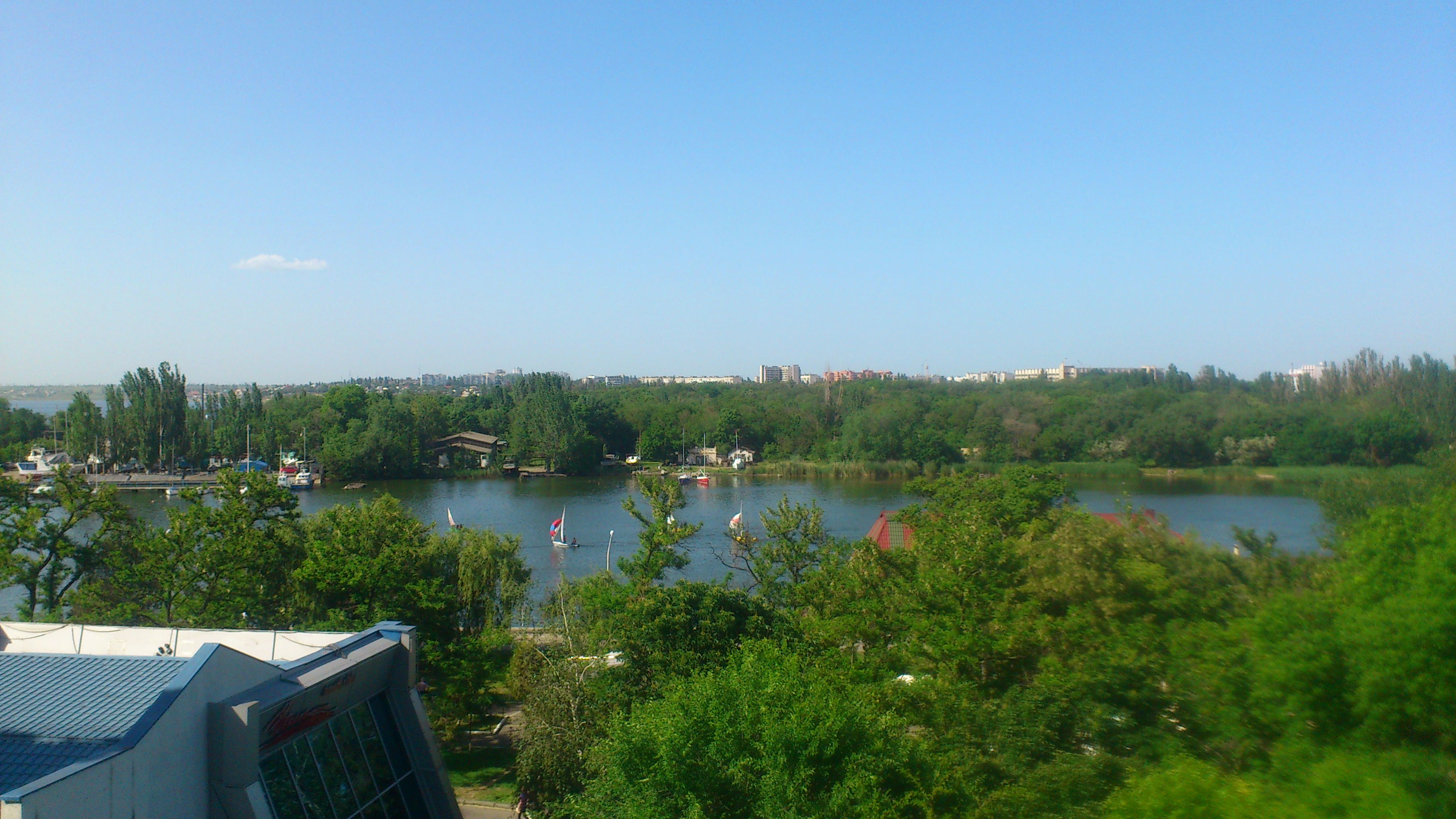 Інгул в Миколаєві, вид з Флотського бульвару